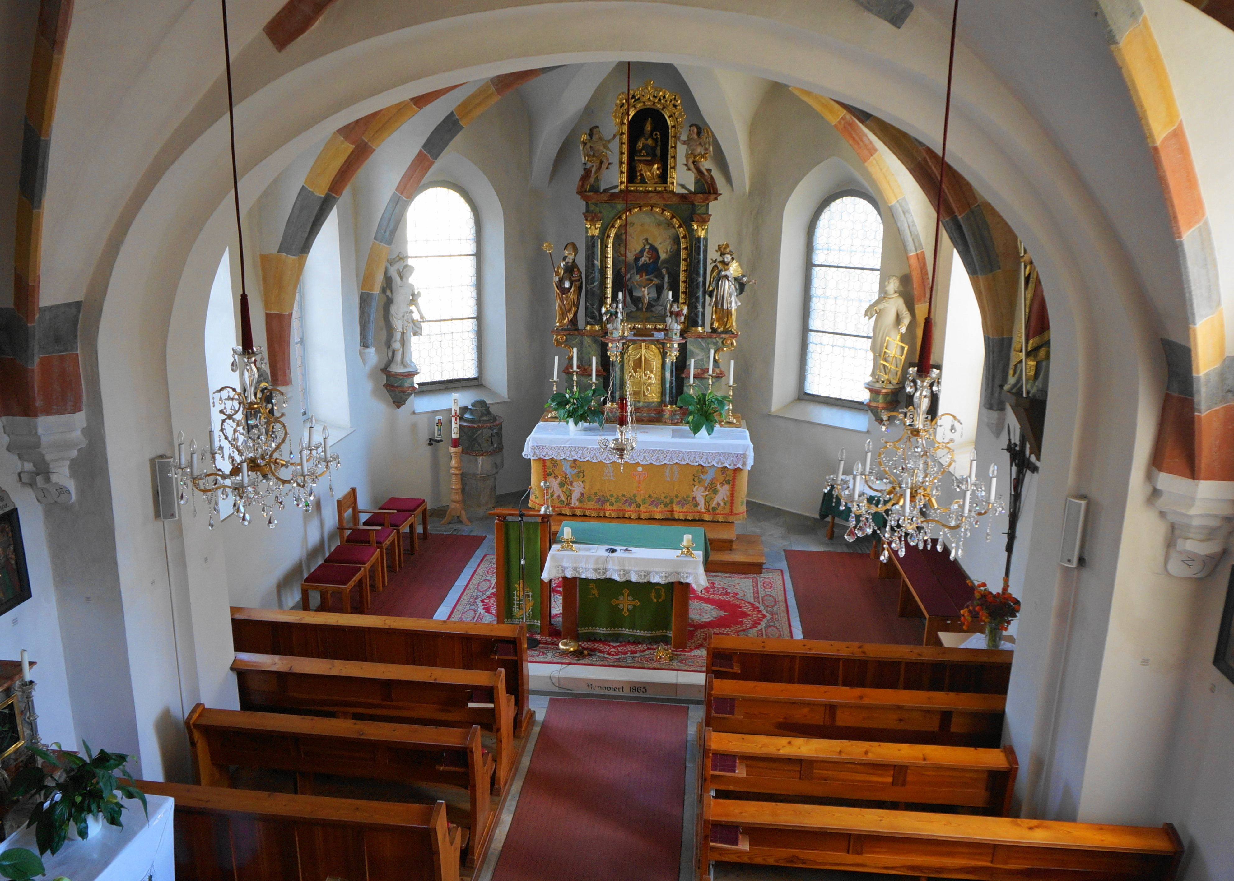 Kath. Pfarrkirche hl. Nikolaus und Friedhof